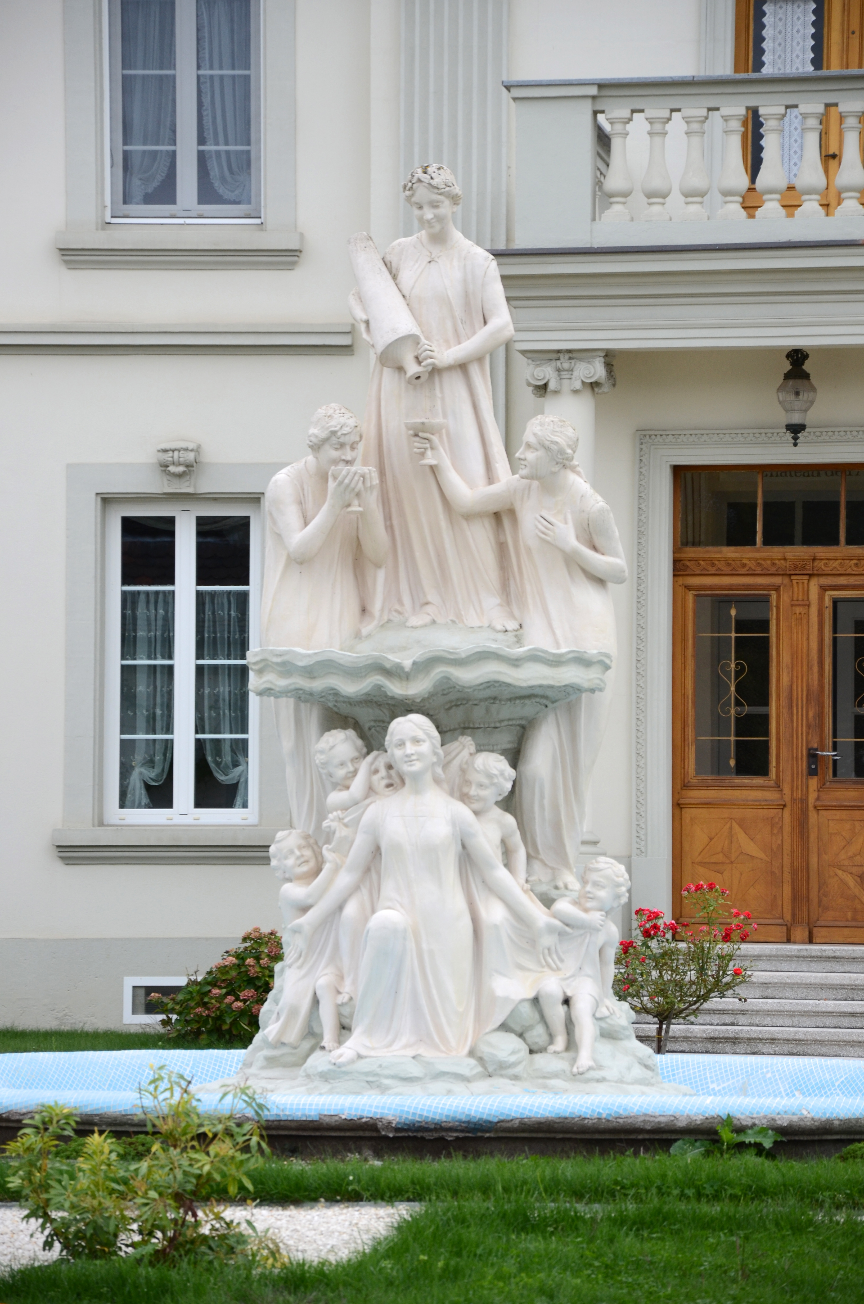 Château Duval, Route de Vallière 27, Cartigny